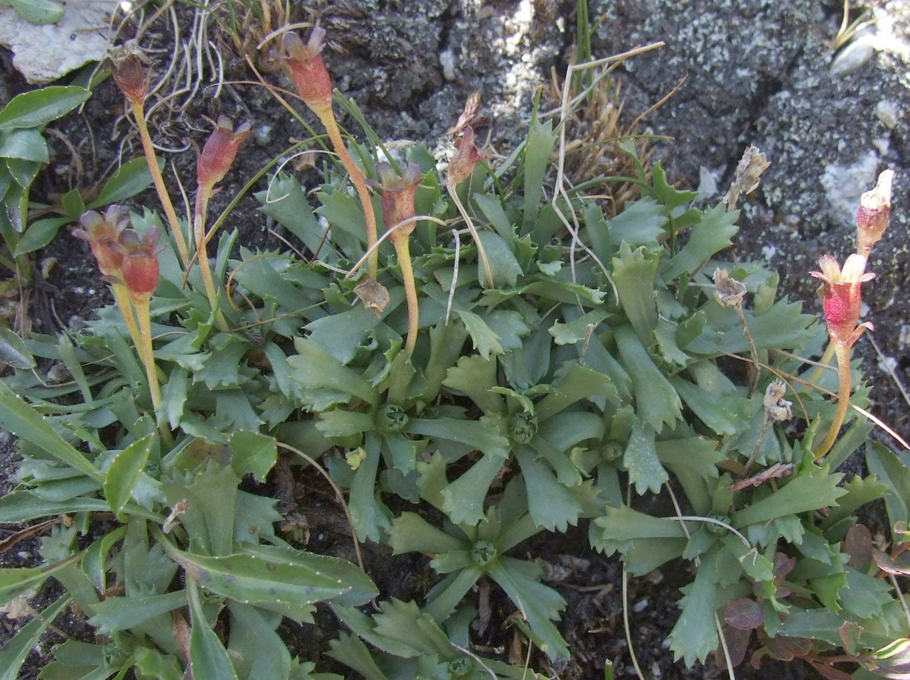 Saxifraga wahlenbergii (fruits). Habitat:High Tatra Mountains (przełęcz Czerwona Ławka)